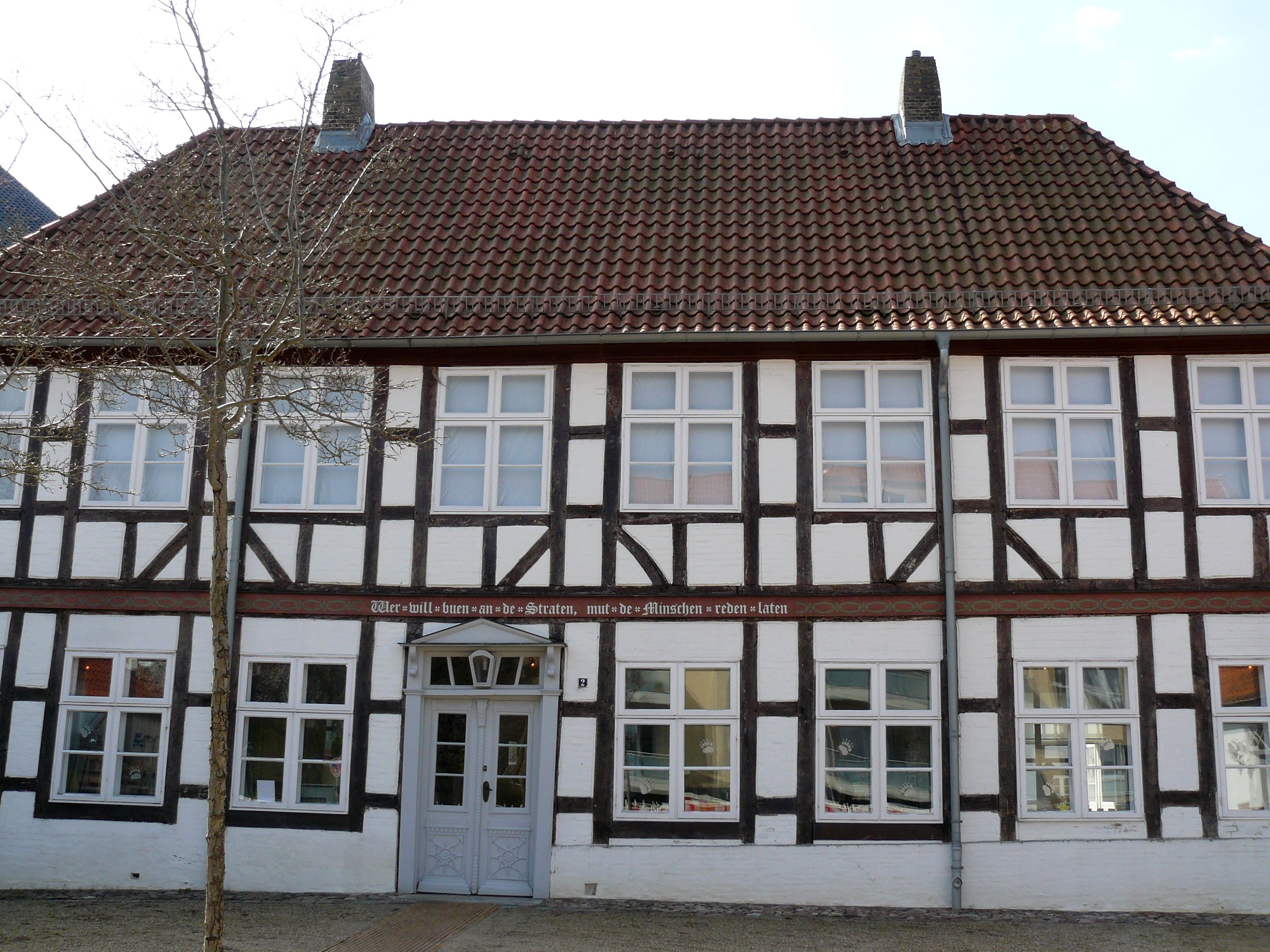 Stadtmuseum im Günderotschem Hof